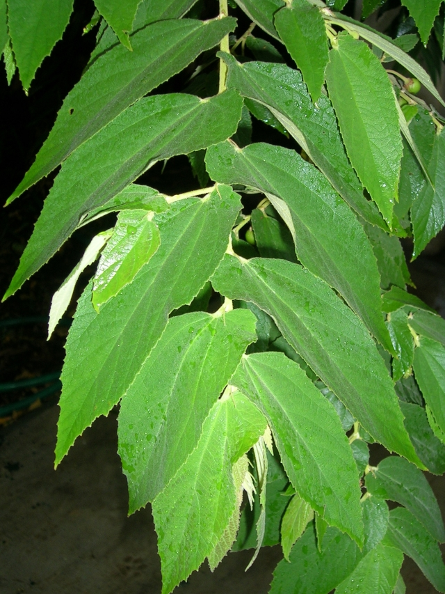 Muntingia calabura